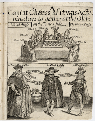 Titelblatt Thomas Middleton "A Game at Chess" (1624) Transkription: A Game at Chæss aſ it was Acted nine days to gether at the Globe The Black-Houſe| on the banks ſide |The White-Houſe Black K: White K: Black Q: White Q: Black D: White D: Fatte Biſop White B: the Fatte Biſhop the Black Knight the White Knight